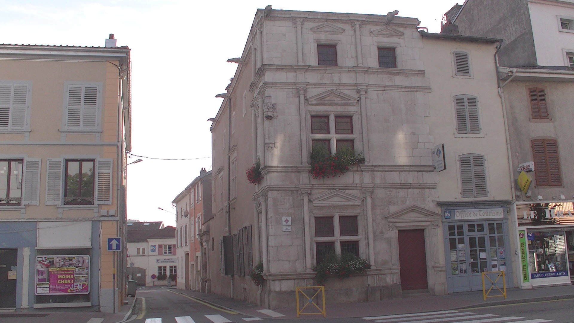 Maison du Chaldron dite des Loups